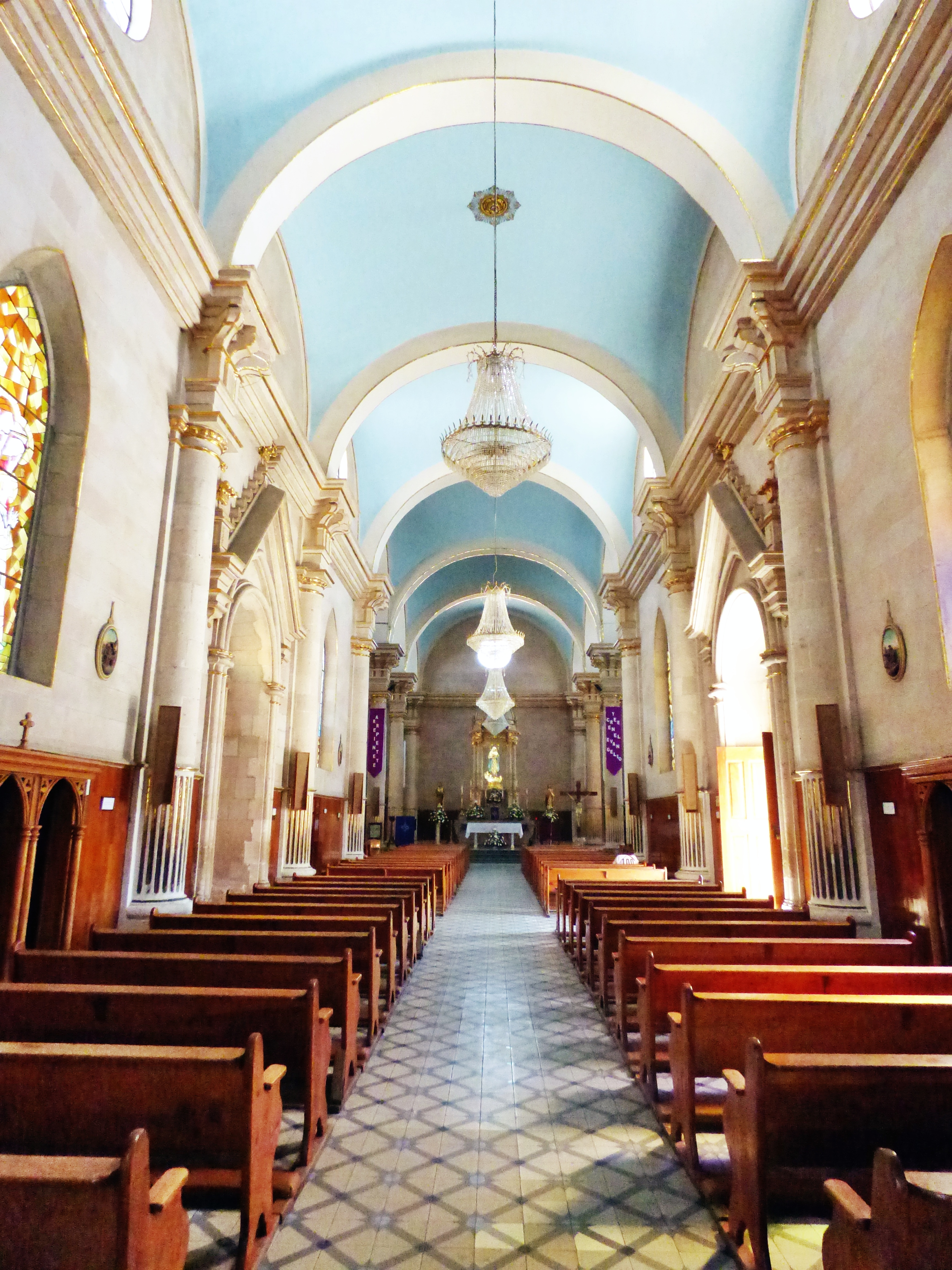 Templo de la Purísima Concepción en Aguascalientes, una obra de Refugio Reyes Rivas.